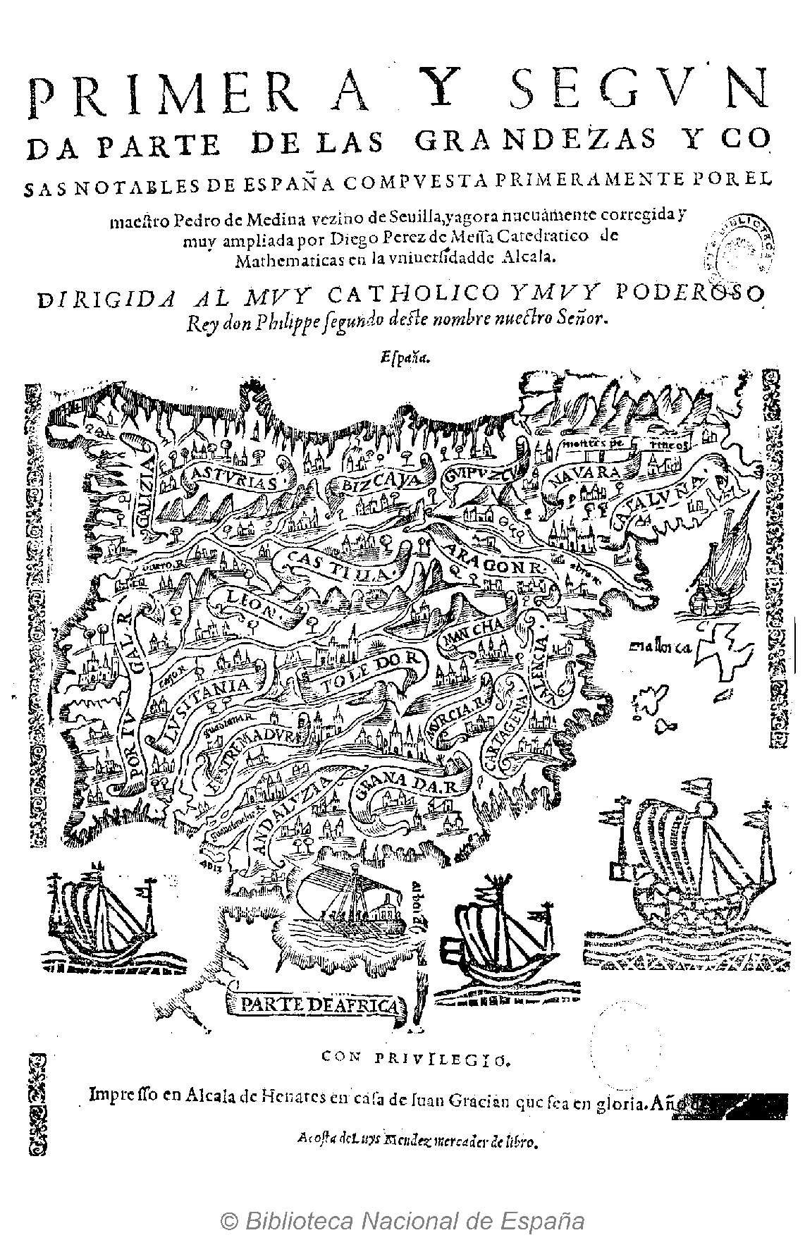 Primera y segunda parte de las Grandezas y cosas notables de España compuesta primeramente por el maestro Pedro de Medina ... Autor: Medina, Pedro de (1493?-1567?). Pérez de Mesa, Diego. Fecha: 1590 Datos de edición Impresso en Alcala de Henares en casa de Iuan Gracian (Gracián, Juan) ... acosta de Luys Mendez (Méndez, Luis (s. XVI).) mercader de libro.